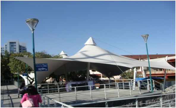 explanada de psicologia